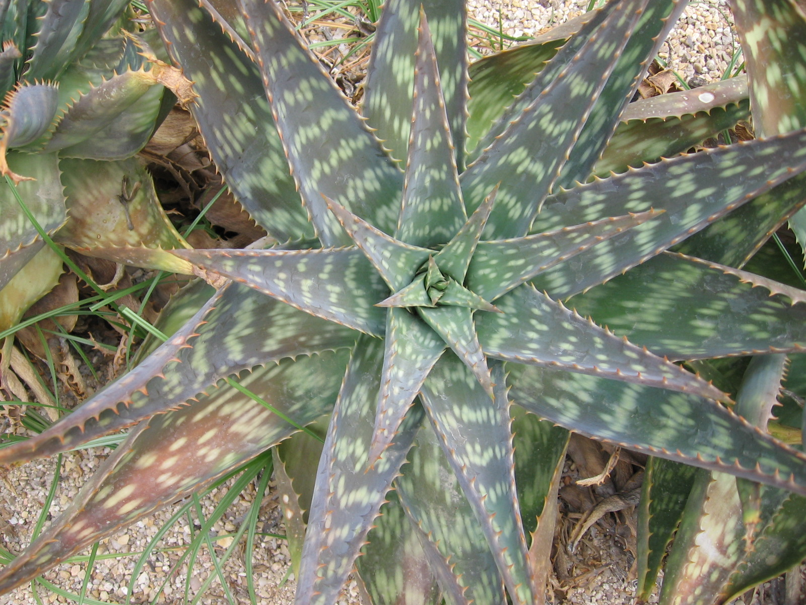 Aloe saponaria. Foto tomada en el Real Jardín Botánico de Madrid.